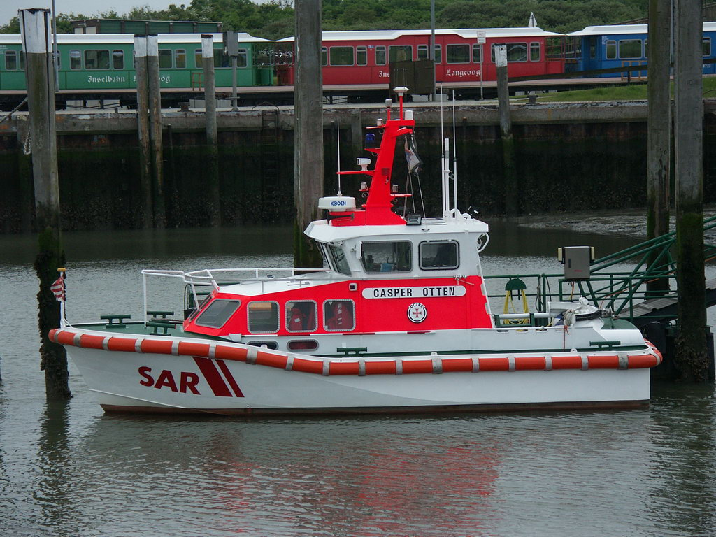 SRB Casper Otten am Liegeplatz auf Langeoog